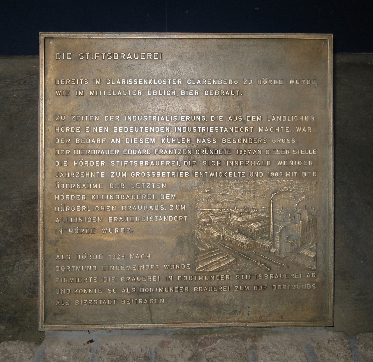 Deutschland, Dortmund, Dortmund-Hörde, Gedenktafel auf dem Gelände der ehemaligen Stifts Brauerei